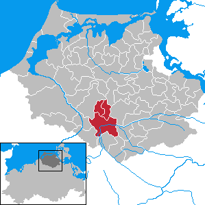 Former Amt Tribsees in Mecklenburg-Vorpommern - District Nordvorpommern